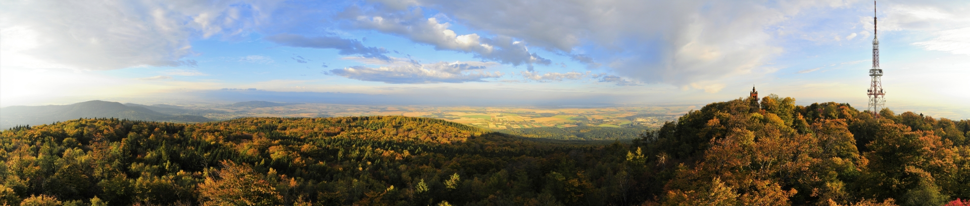 Sobótka, zespół kościoła fil. p.w. Nawiedzenia NMP